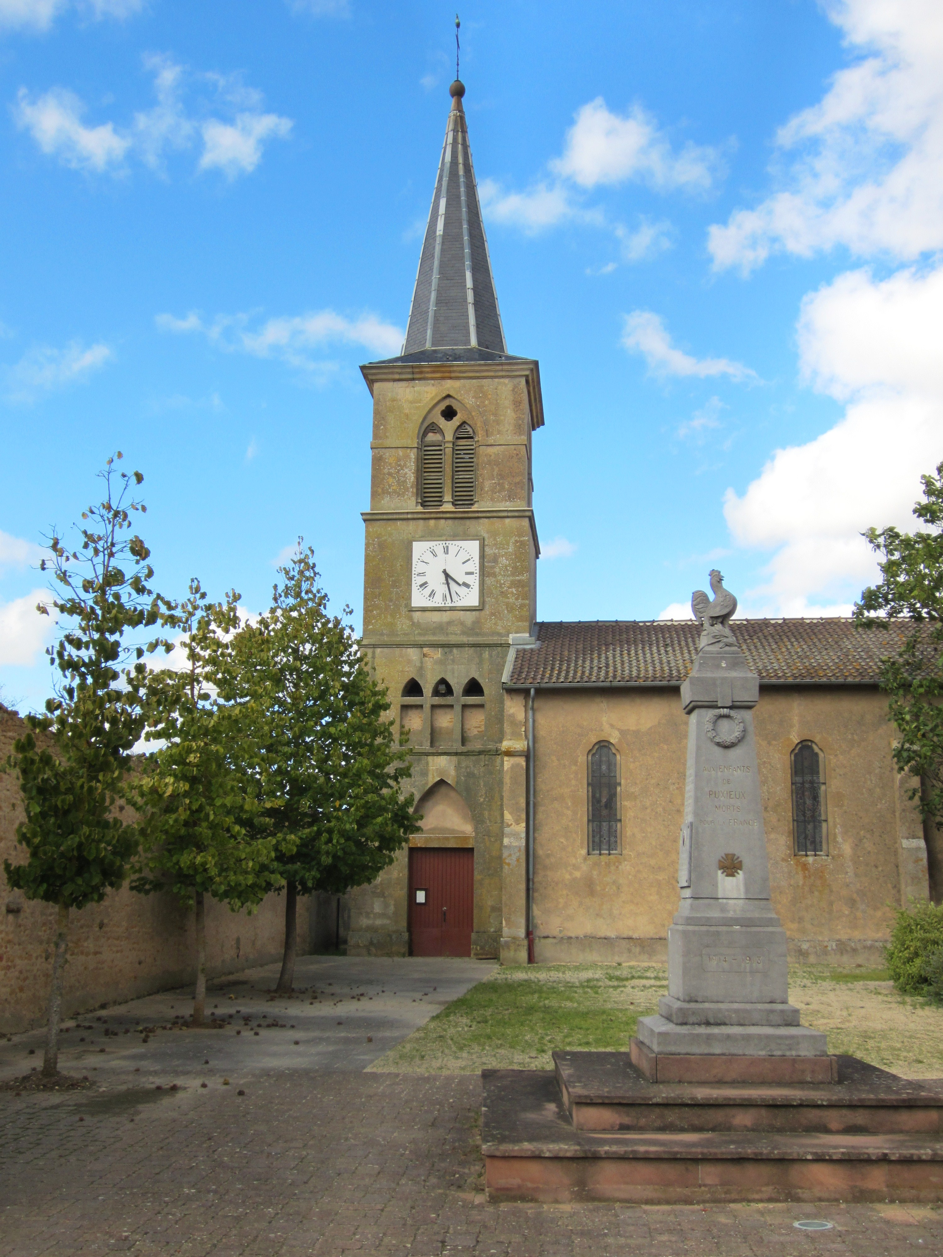 Description eglise Puxieux eglise Puxieux